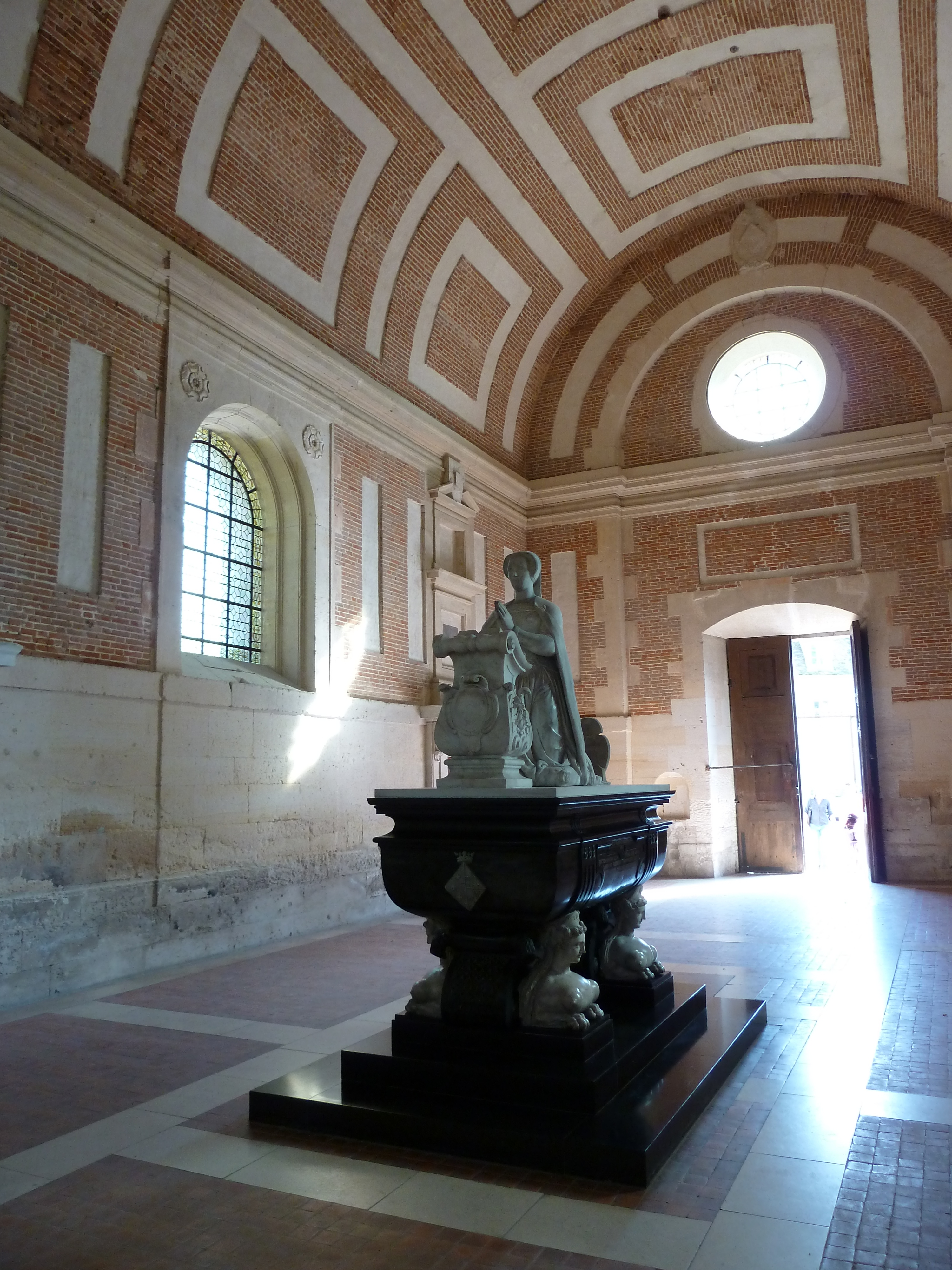 Château d'Anet - Anet - Eure-et-Loir - France - Mérimée PA00096955 .